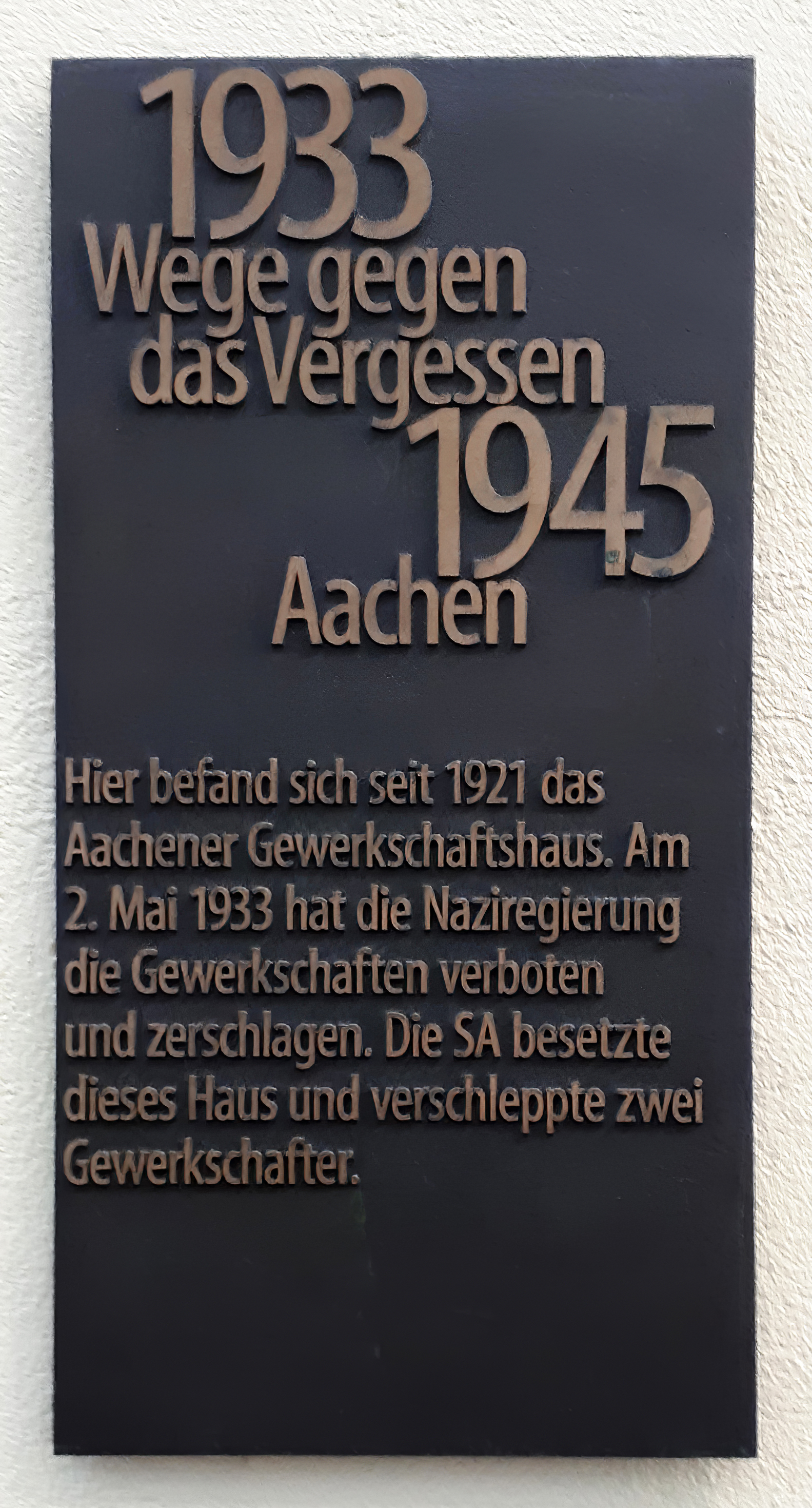 Gedenktafel im Rahmen "Wege gegen das Vergessen" am ehemaligen "Londoner Hof" in der Kleinkölnstraße in Aachen